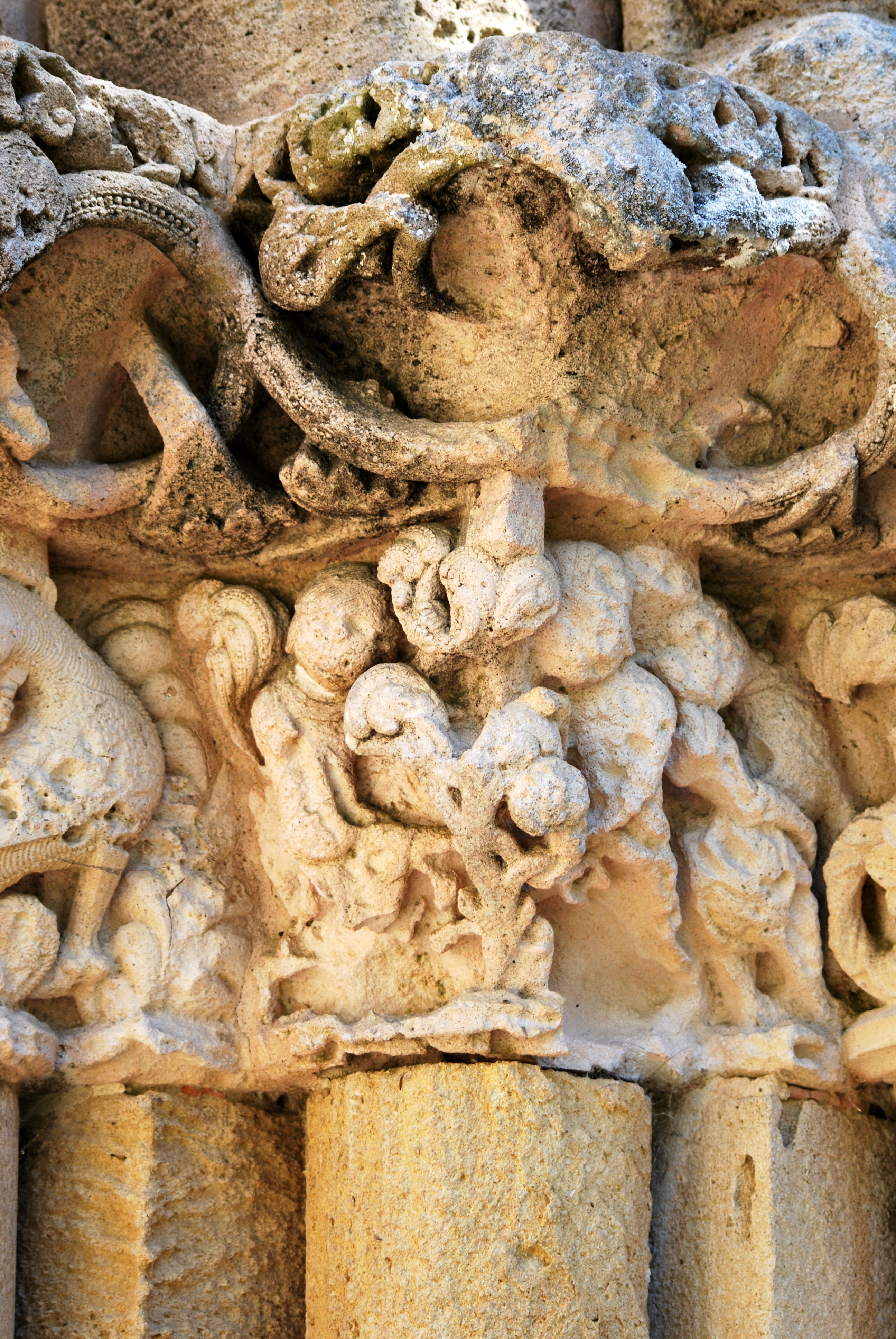 Blasimon église St Nicolas portail